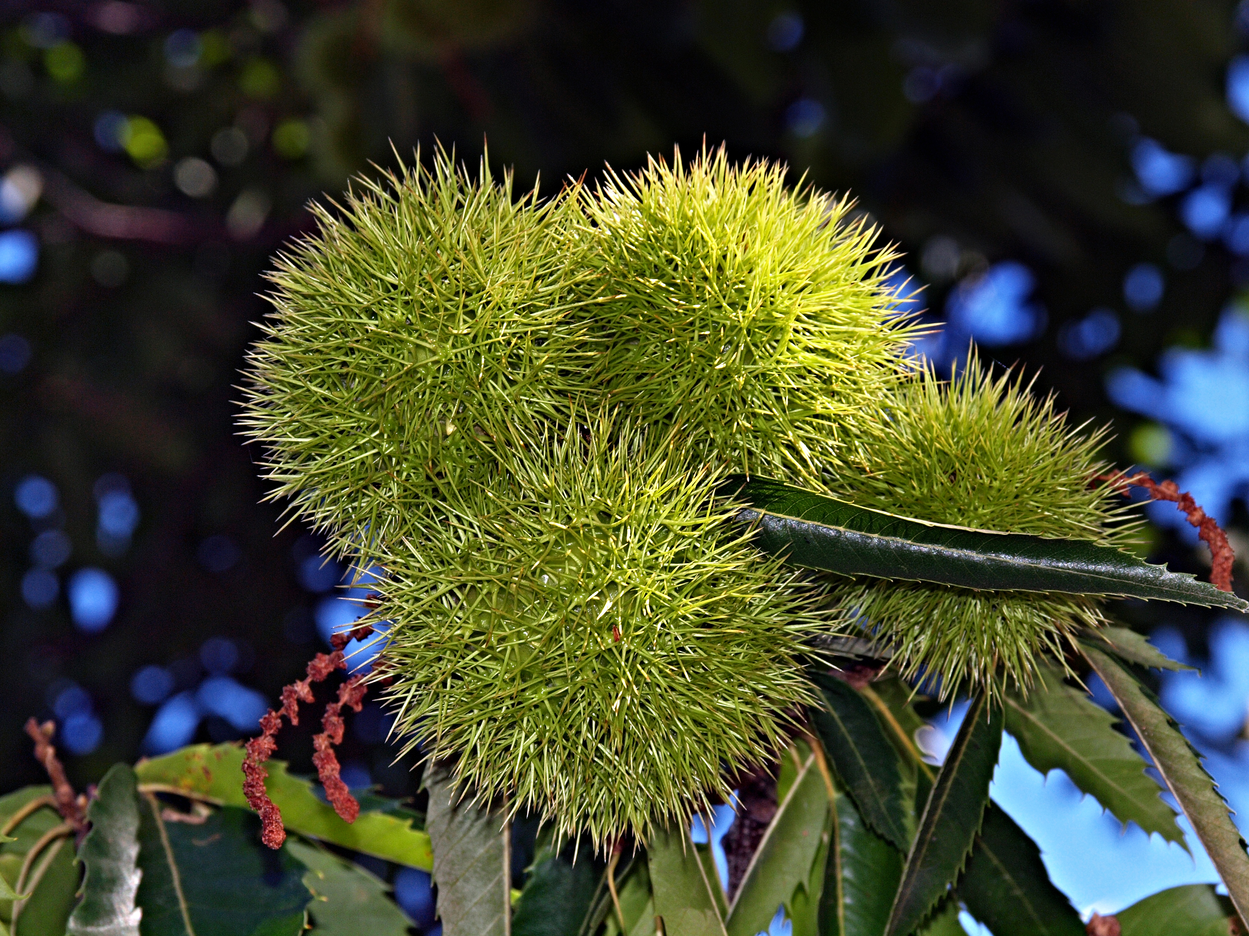 Évisa, Ouest Corse (Corse) - Châtaignes vertes